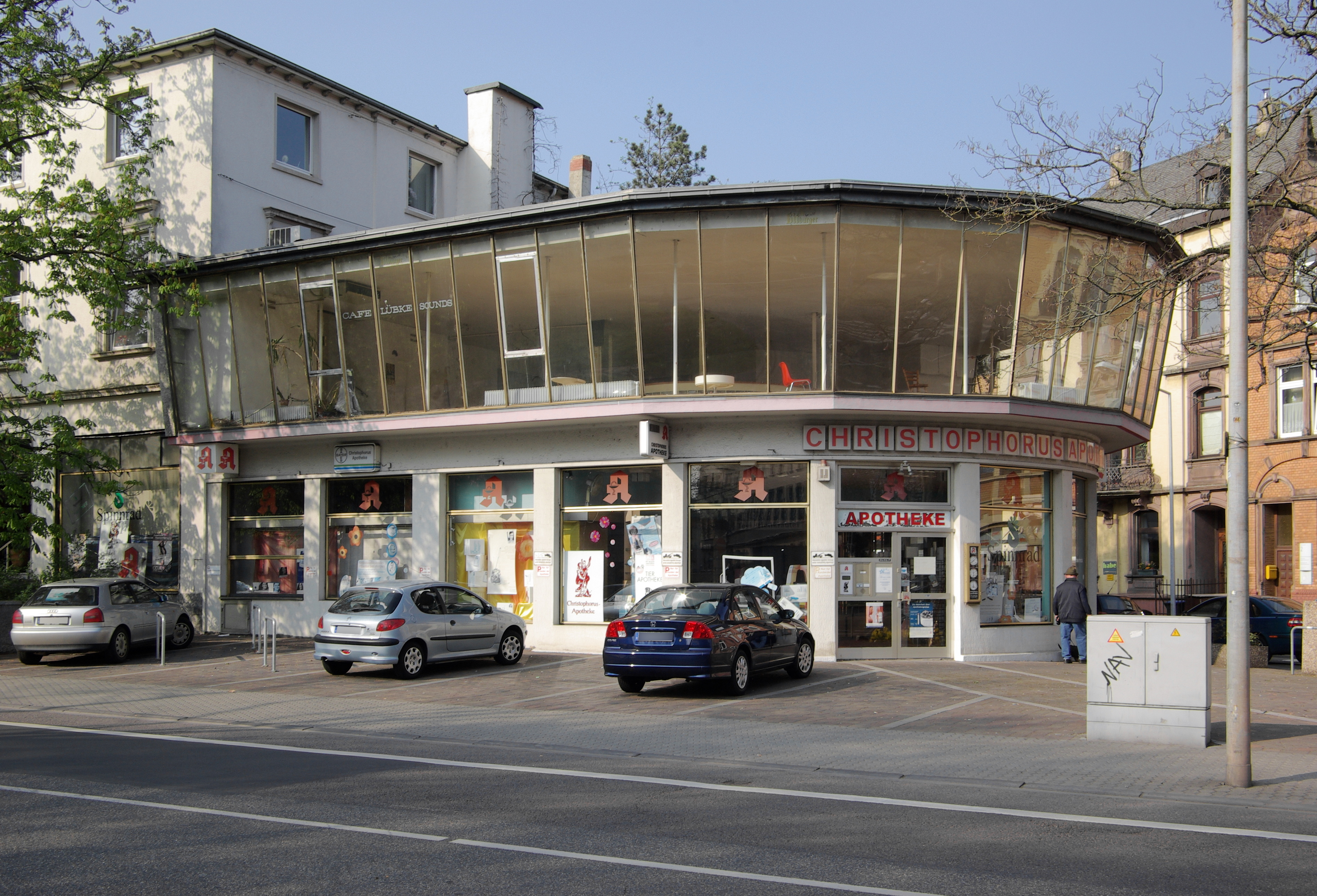 Trier, Theodor-Heuss-Allee 18: der weitgehend in große Fenster aufgelöste Eckladen, 1933 durch Architekturbüro Brand und Mertes einem Wohnhaus von 1880 angebaut, 1956 zeittypisch aufgestockt mit polygonaler Verglasung mit schräg nach außen gestellten Fenstern